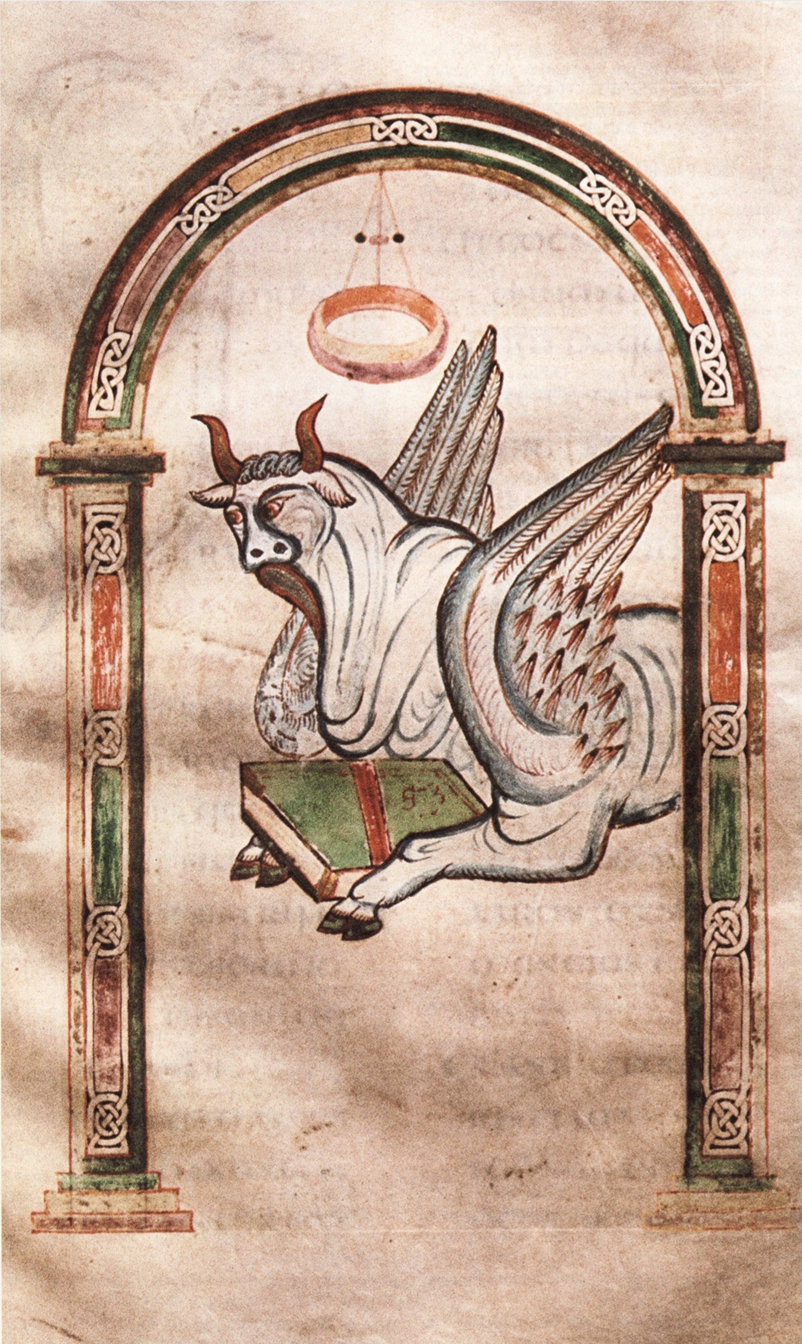 Darstellung des Heiligen Lukas als geflügelter Stier im Codex Millenarius (Stiftsbibliothek Kremsmünster)